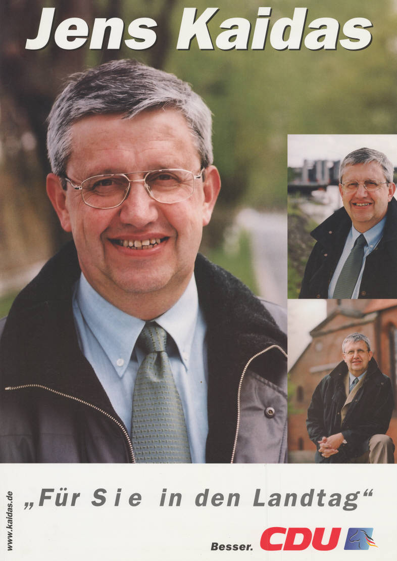 Jens Kaidas "Für Sie in den Landtag" Besser. CDU Abbildung: Porträtfotos - Niedersachsenross mit Nationalfarben Plakatart: Kandidaten-/Personenplakat mit Porträt Objekt-Signatur: 10-008 : 1323 Bestand: Landtagswahlplakate Niedersachsen ( 10-008) GliederungBestand10-18: Landtagswahlplakate Niedersachsen (10-008) » CDU Lizenz: KAS/ACDP 10-008 : 1323 CC-BY-SA 3.0 DE